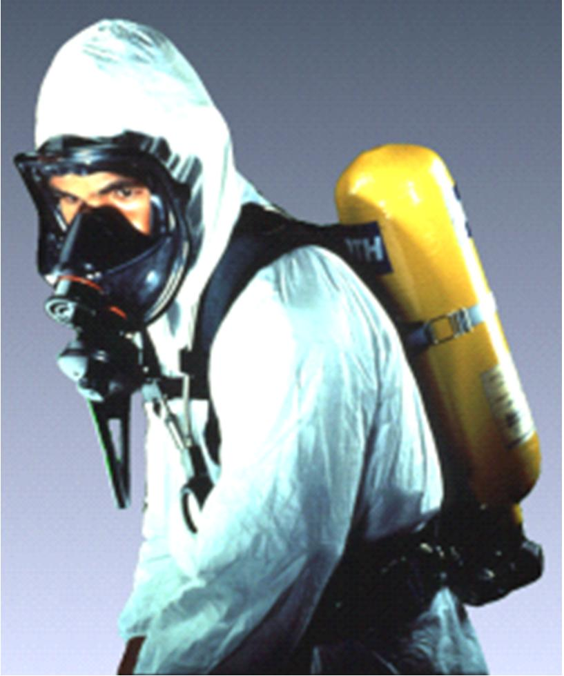 Автономный дыхательный аппарат